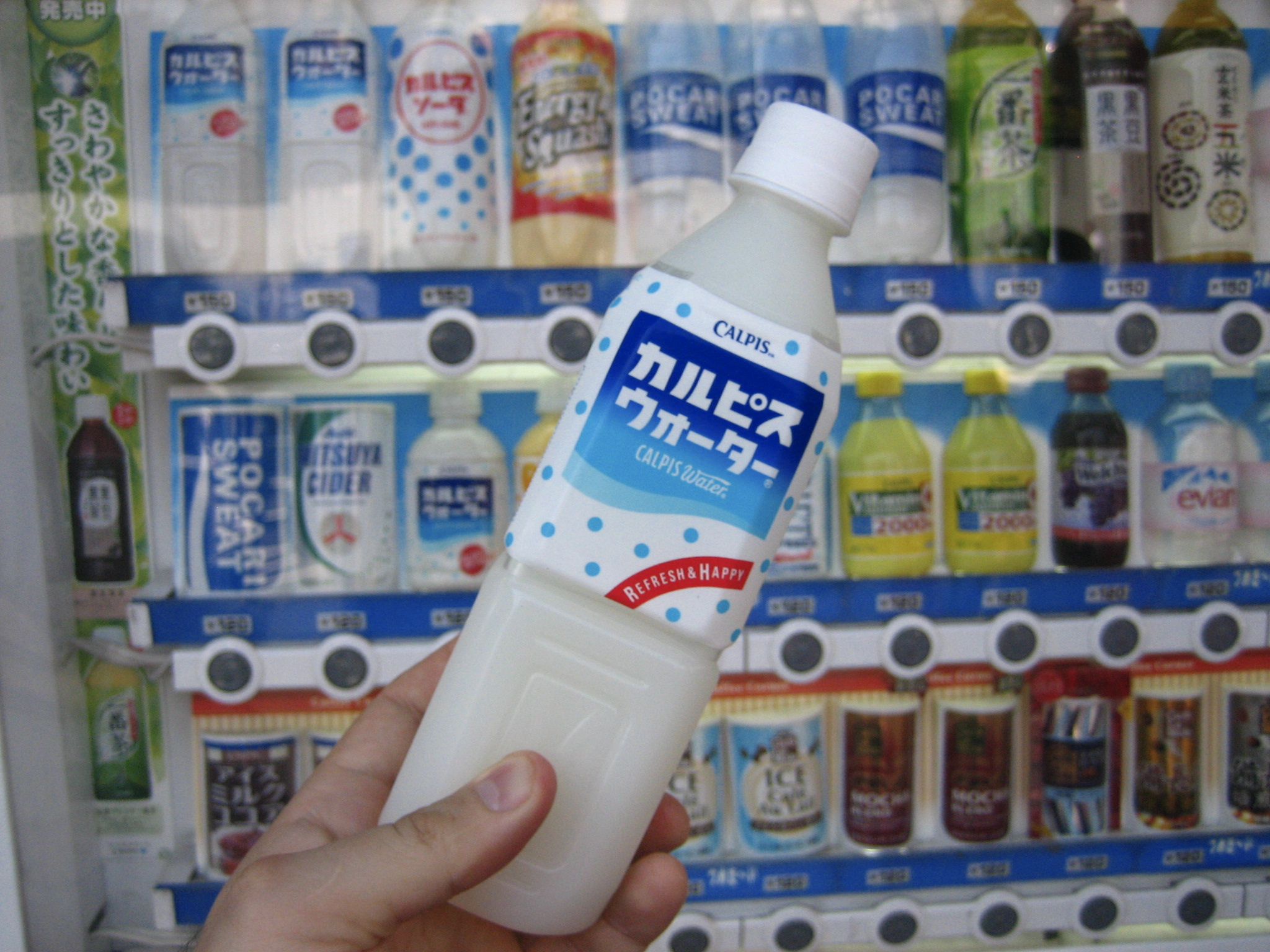 Calma tu sed...